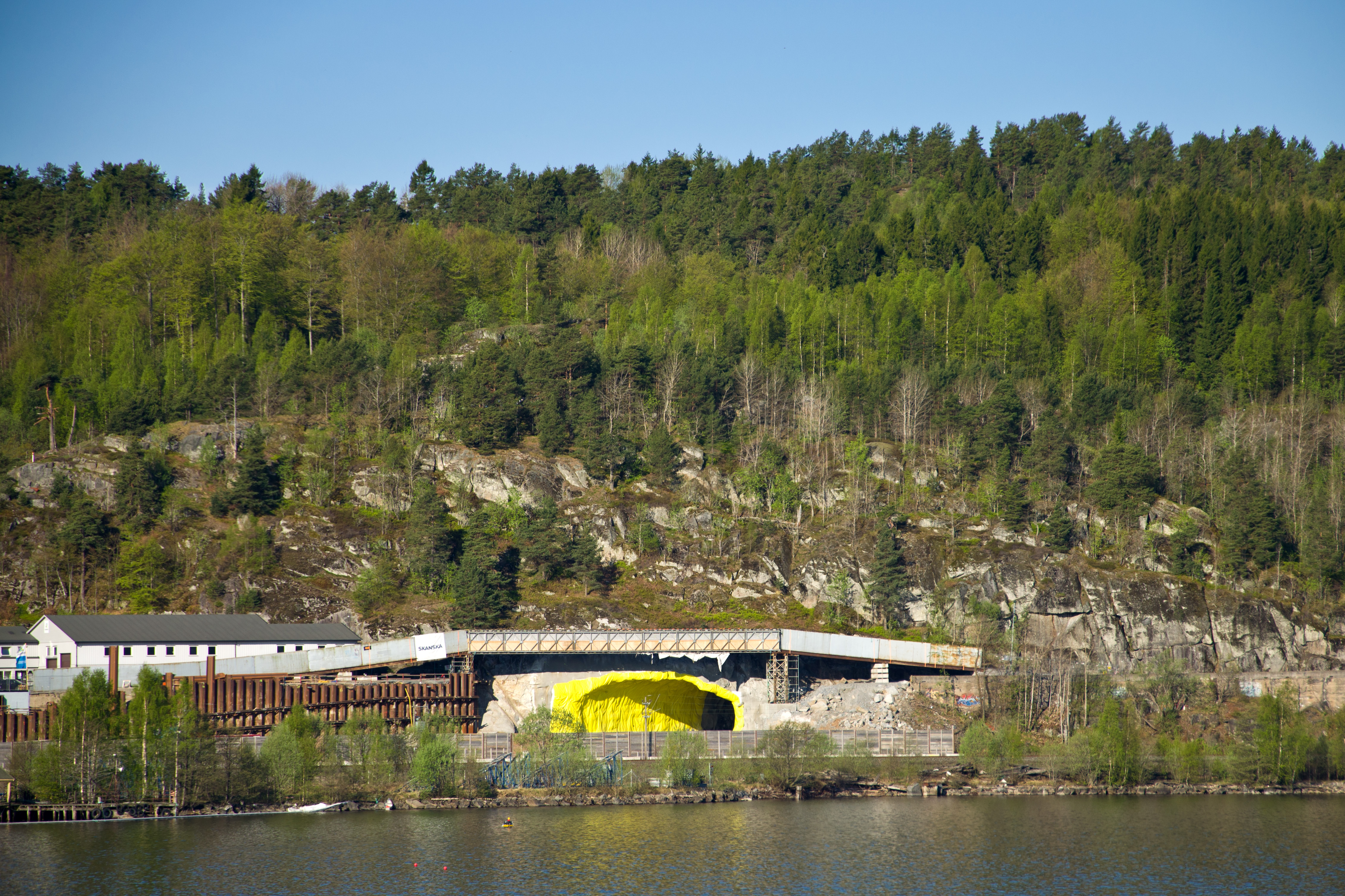 Martineåsen tunnel, sørøstre innslag, april 2014. Larvik, Vestfold, Norge